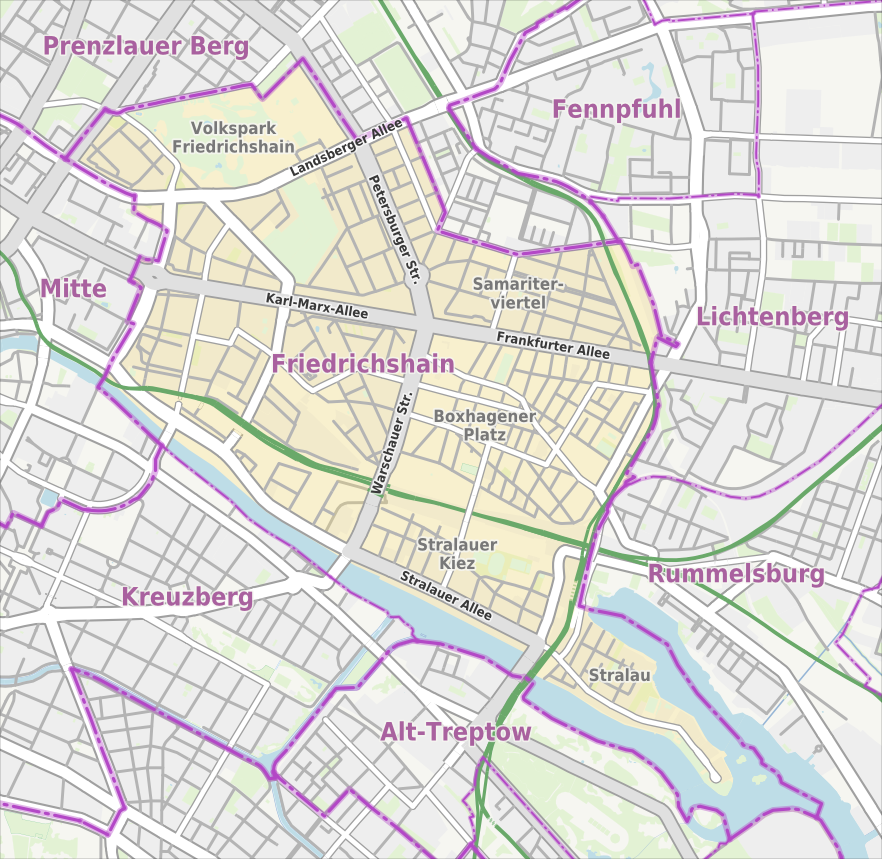 Übersichtskarte der Straßen und Ortslagen in Berlin-Friedrichshain